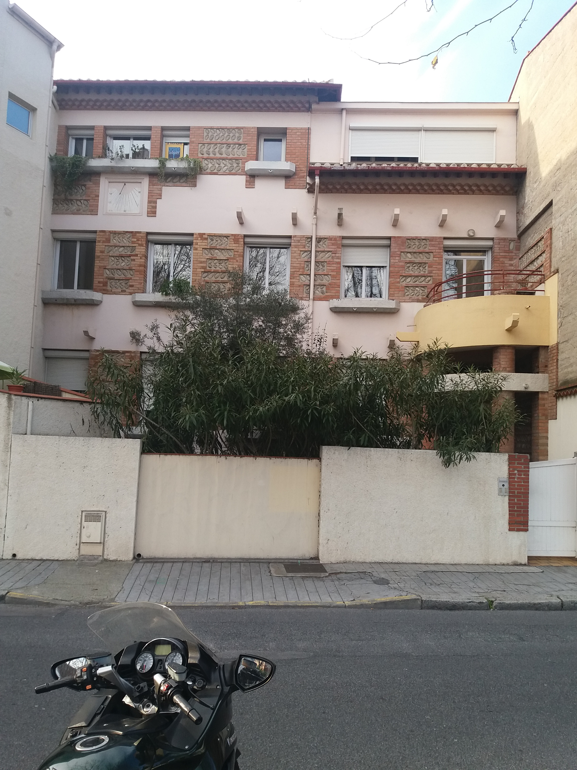 Antiga Clínica de Sant Roc de Perpinyà